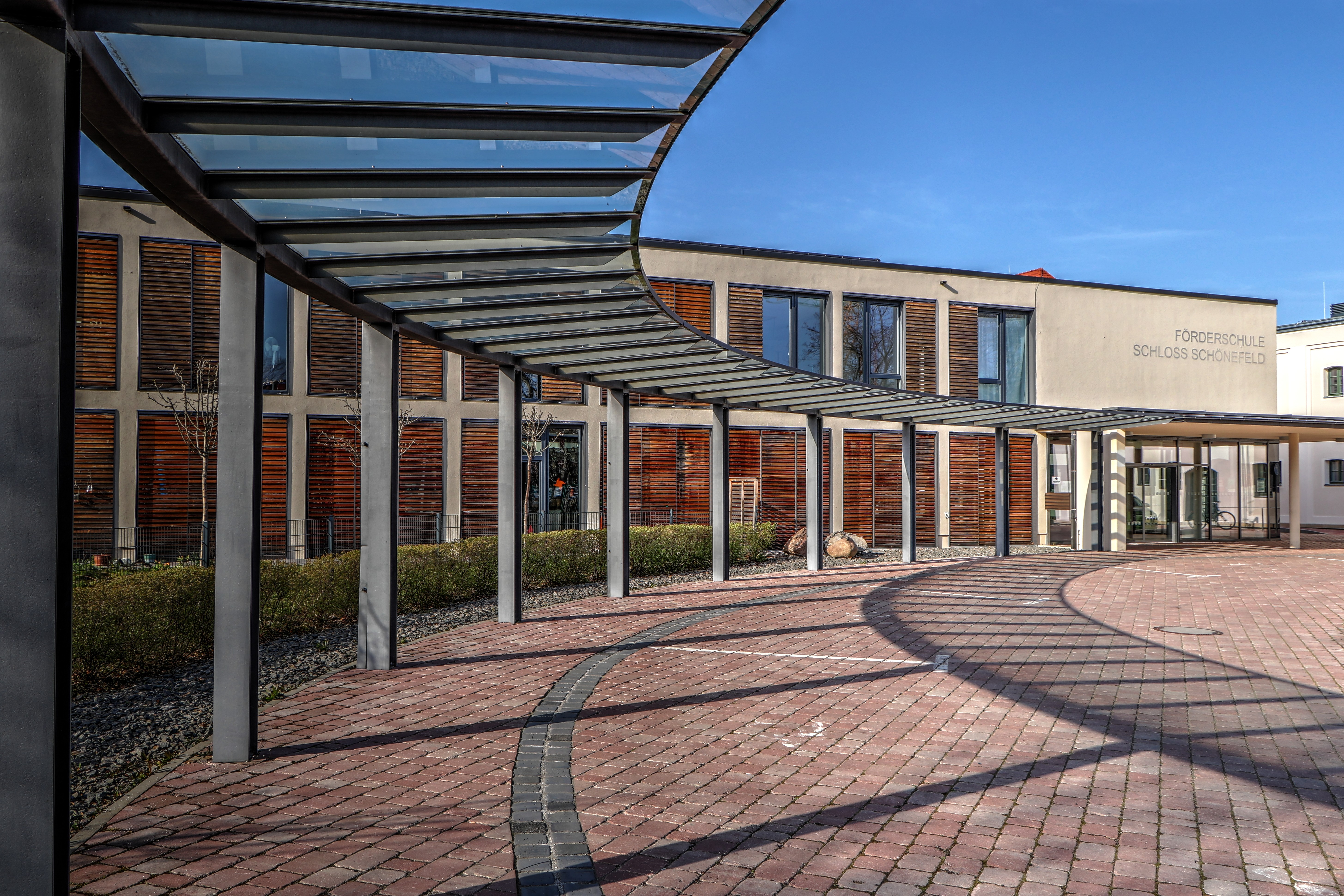 Das Schönefelder Schloss in Schönefeld (Leipzig) 2020 - Eingangsbereich der Förderschule Schloss Schönefeld auf der Südseite des Schloss-Areals